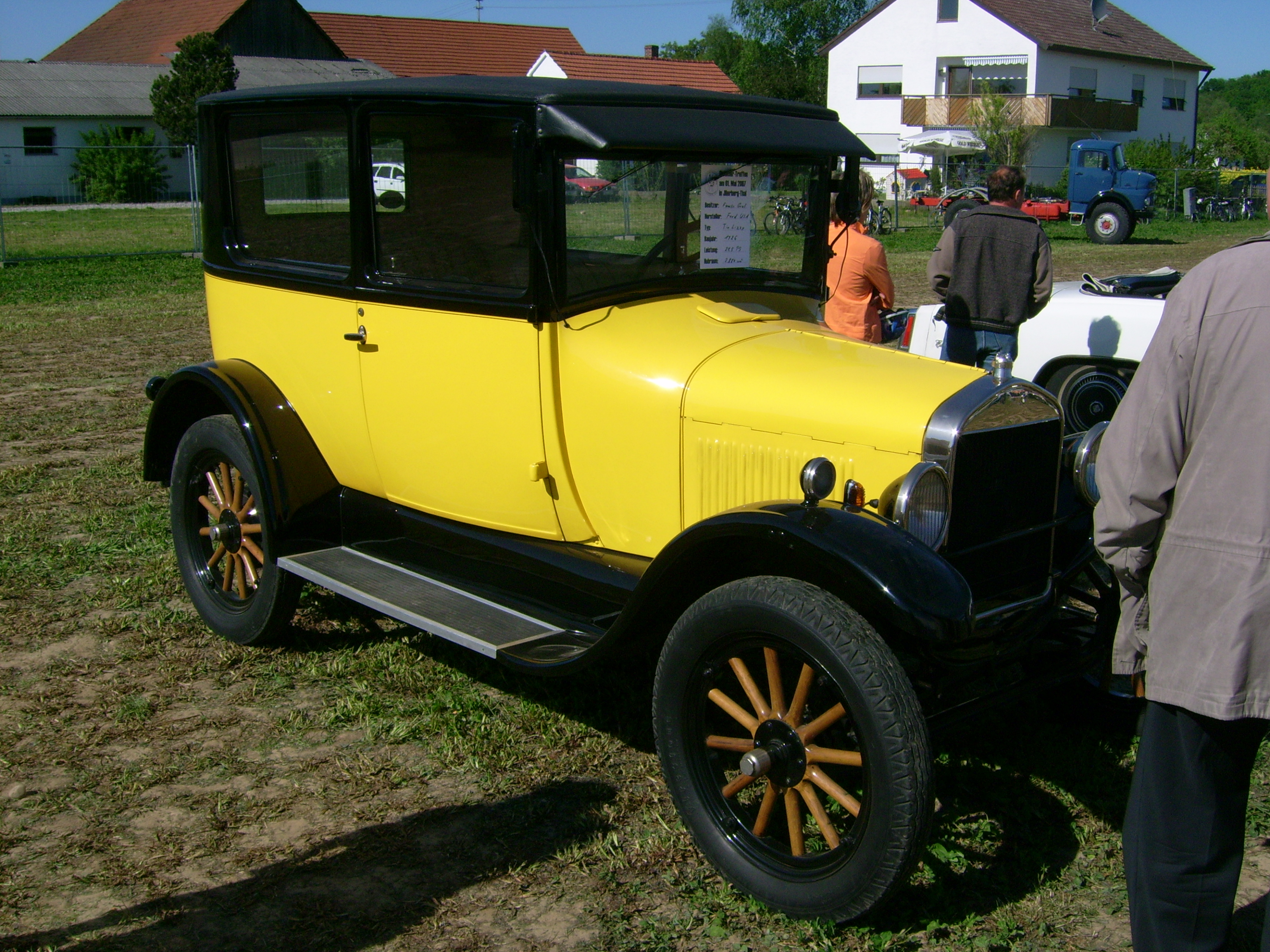 Ford Model T von 1926, fotografiert beim 100. Jubiläum des ZSSV Illerberg-Thal am 01.05.2007